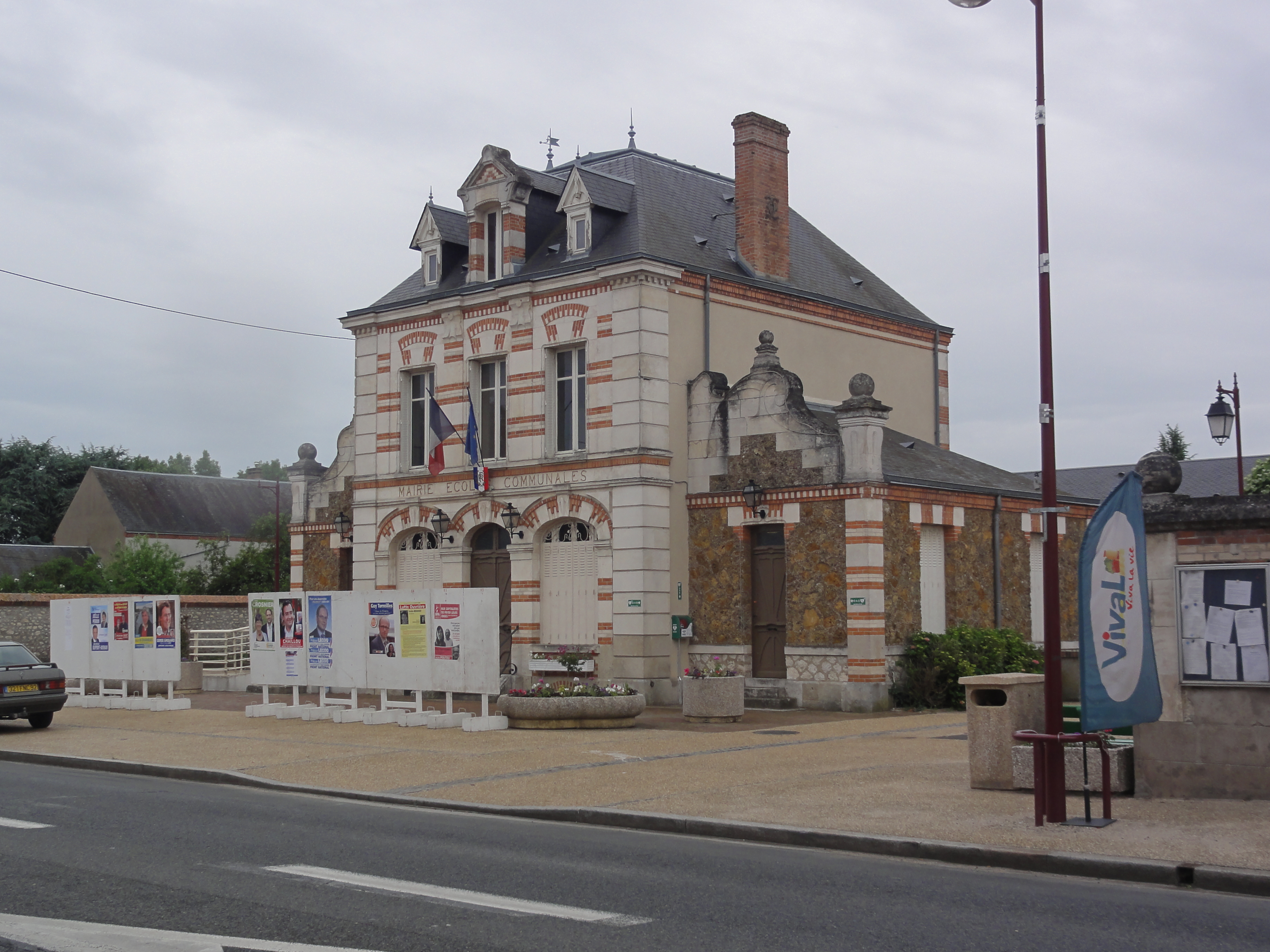 Cercottes (Loiret) Mairie - école